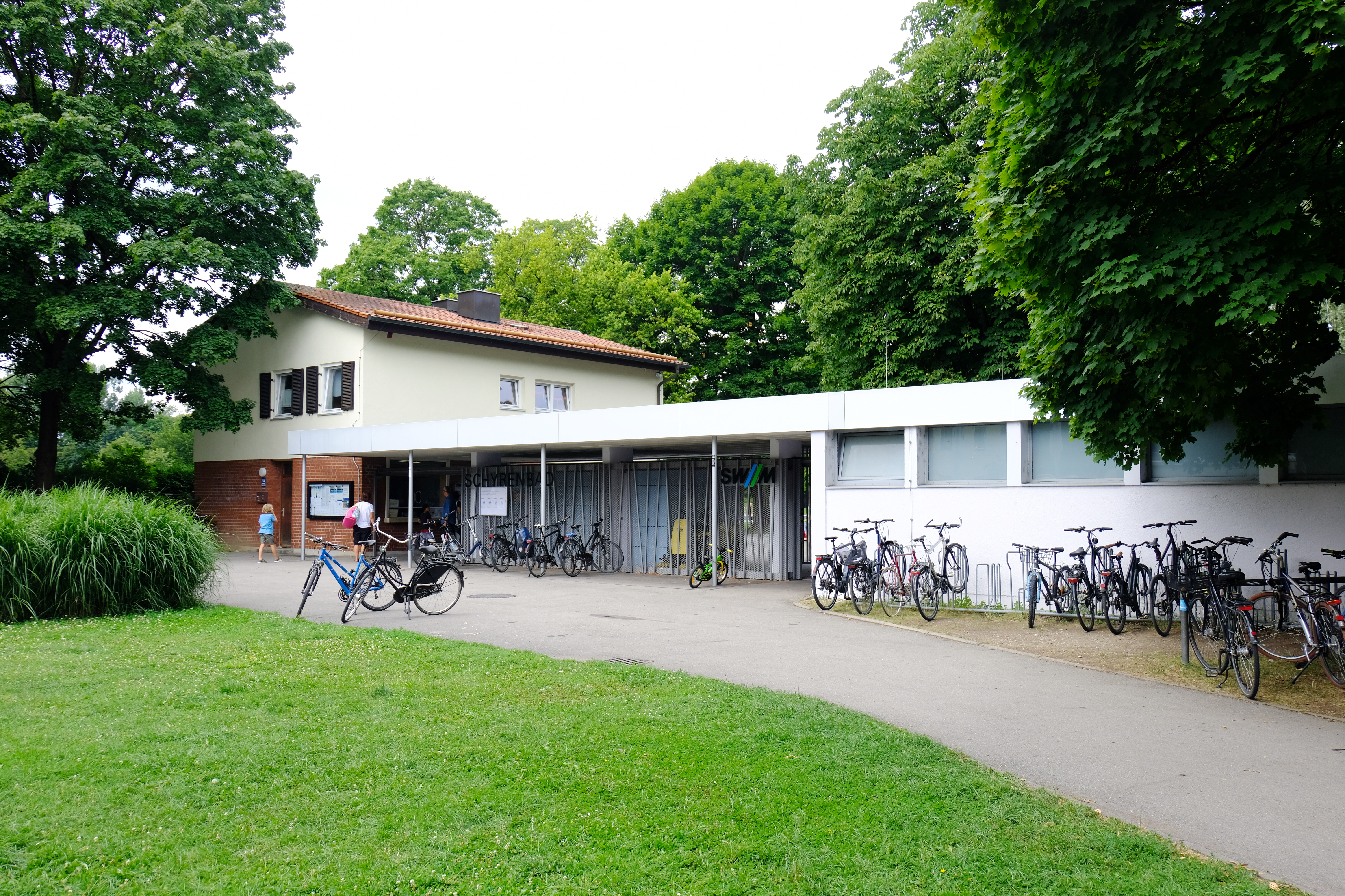 Eingang des Münchner Schyrenbads (2019)